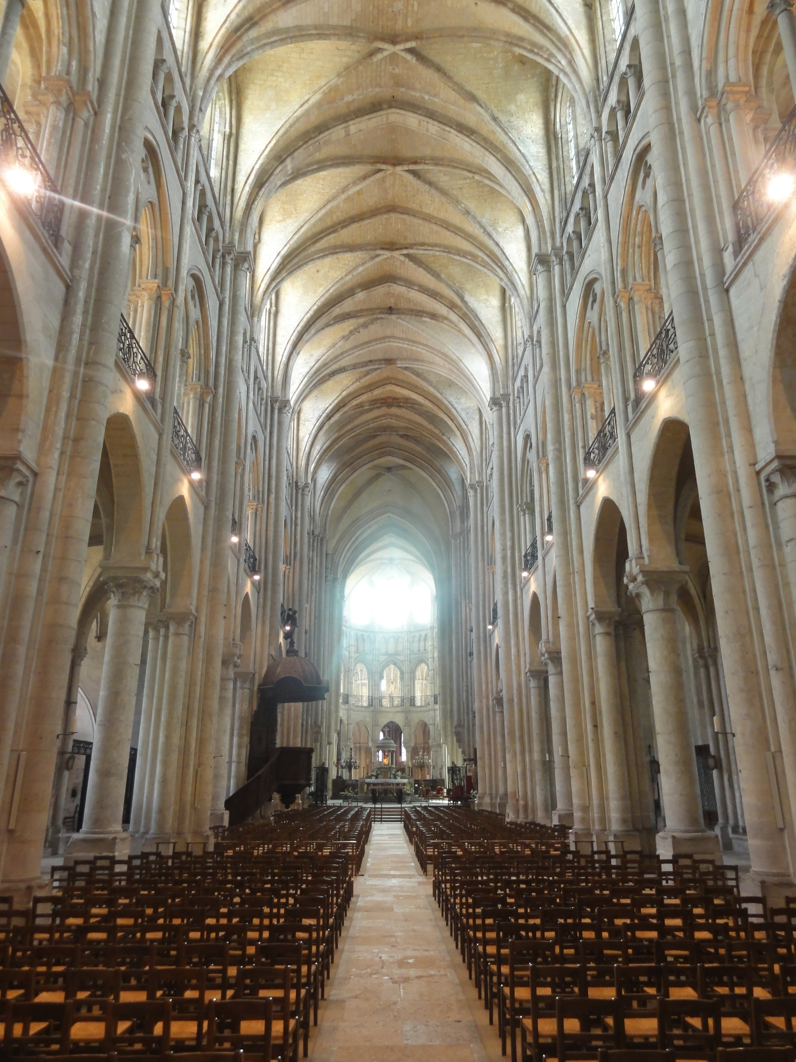 Nef de la cathédrale - voir le titre du fichier.